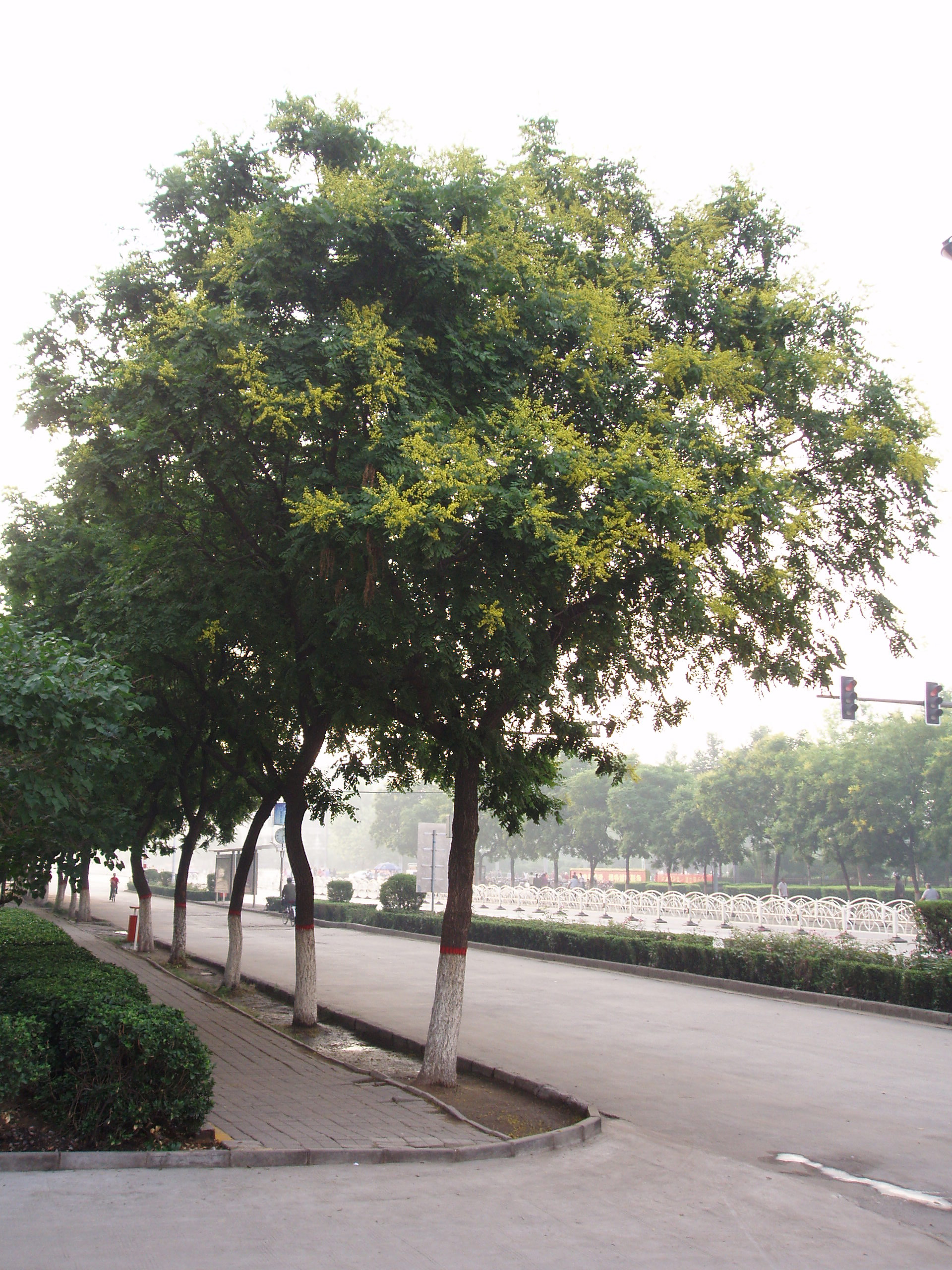 Goldenrain tree